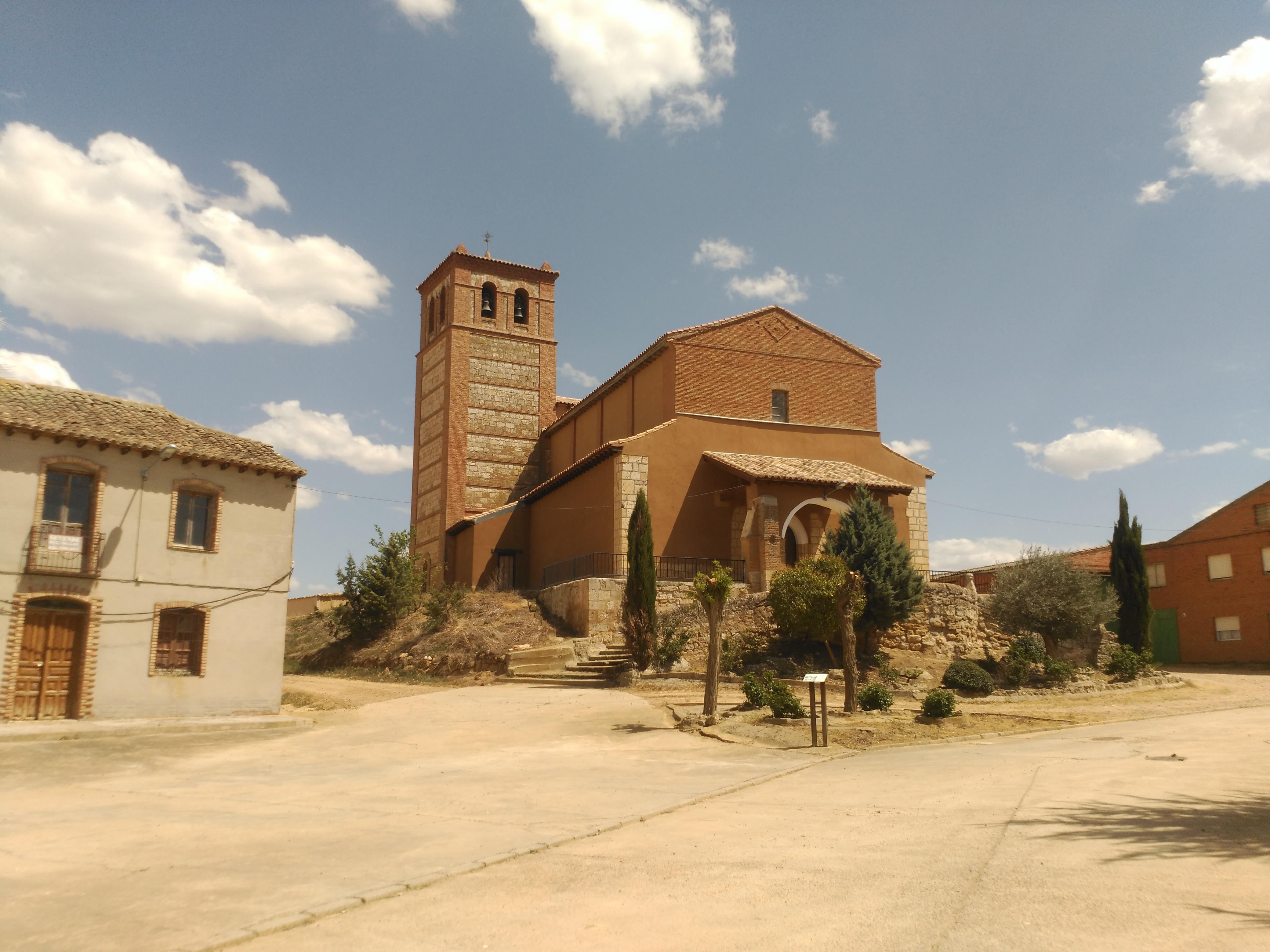 Iglesia de Nuestra Señora de la Calle (siglos XVI-XVII), parroquia de Villabaruz de Campos, en la provincia de Valladolid (España).